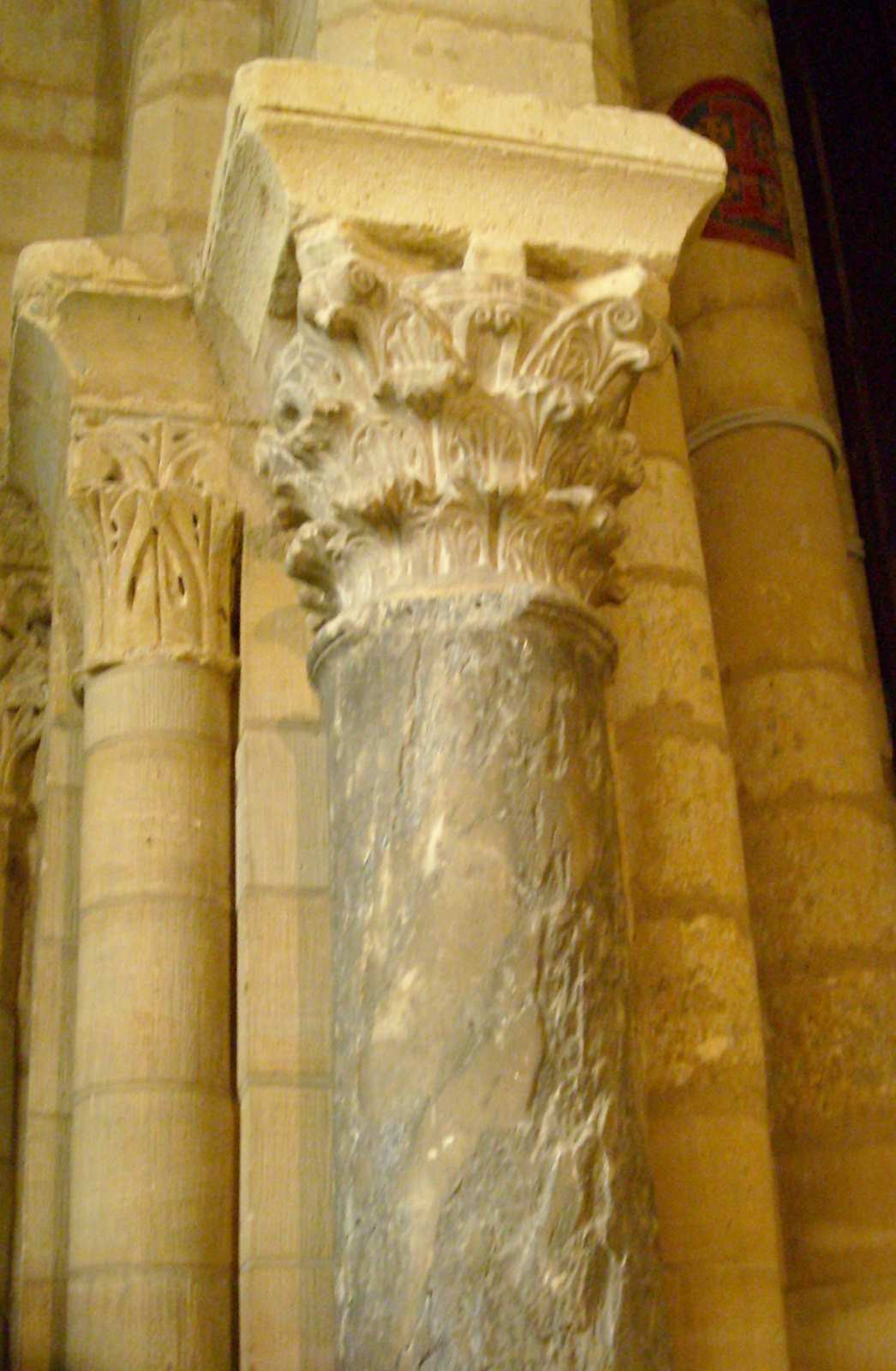 Une des colonnes antiques présentes dans l'église Saint-Pierre de Montmartre